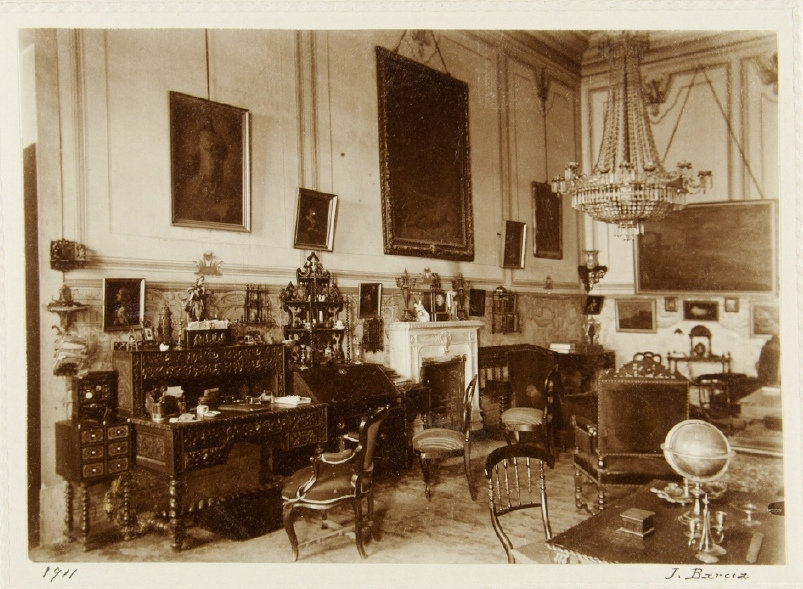 Copia positiva. Salón de la casa de Carolina Coronado en Lisboa.